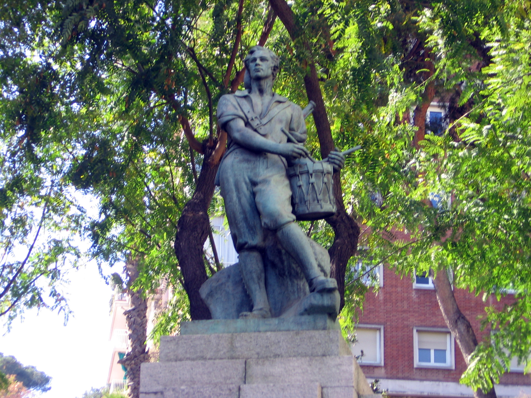 Tamborilero del Bruc (1951), de Frederic Marès, calle Corinto.